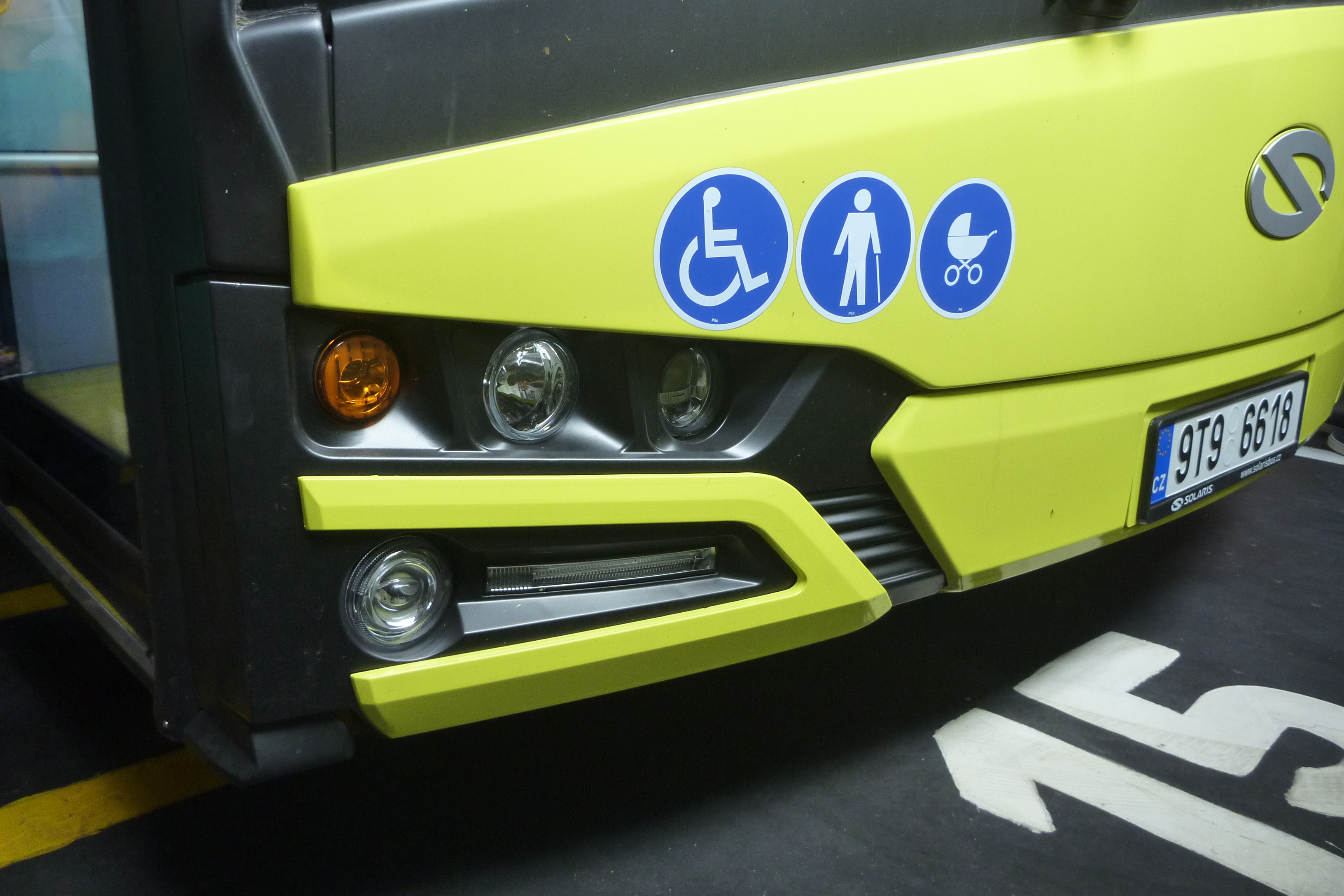 Zkušební Solaris Urbino 18 IV v dílnách vozovny